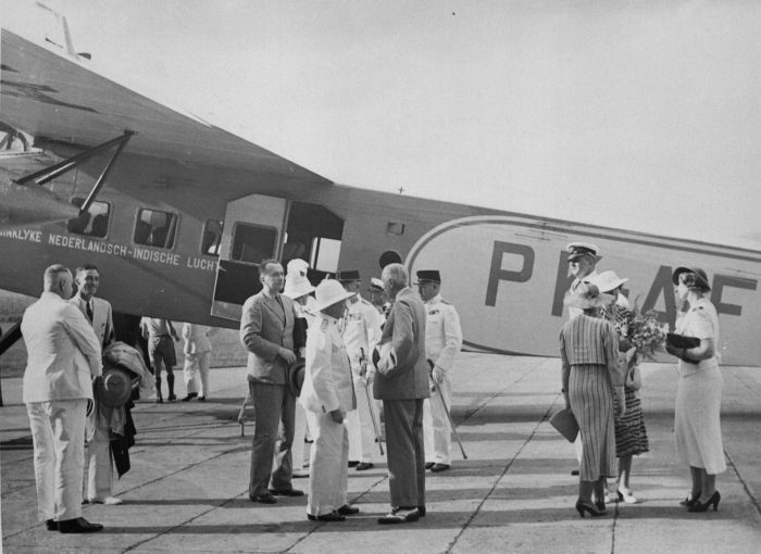 Foto. Aankomst van de Gouverneur-Generaal van Australië met een vliegtuig van de KNILM op het vliegveld Andir bij Bandoeng